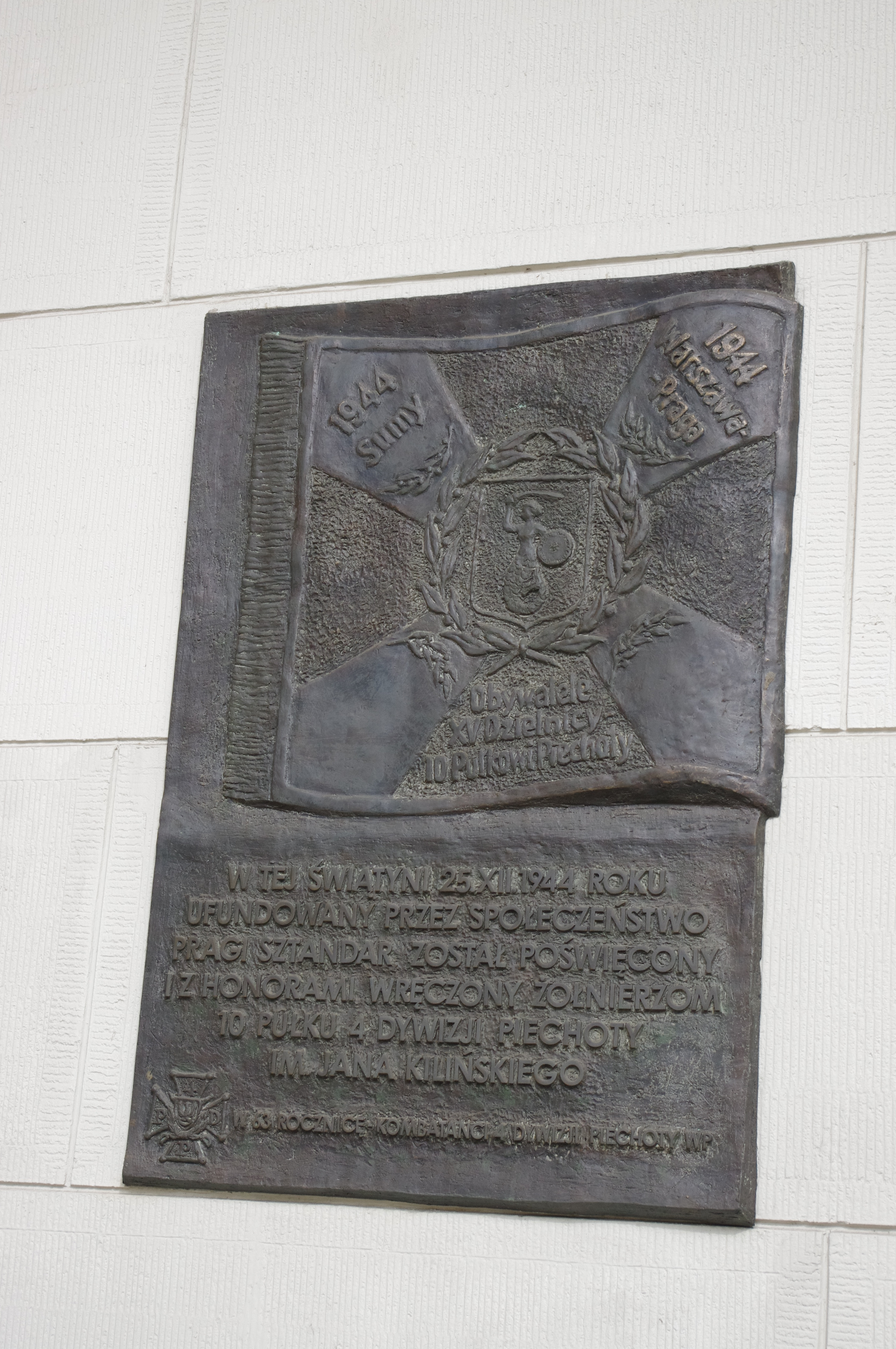 Tablica upamiętniająca poświęcenie sztandaru 10 Pułku 4 Dywizji Piechoty im. Jana Kilińskiego na ścianie Bazyliki Najświętszego Serca Jezusowego w Warszawie